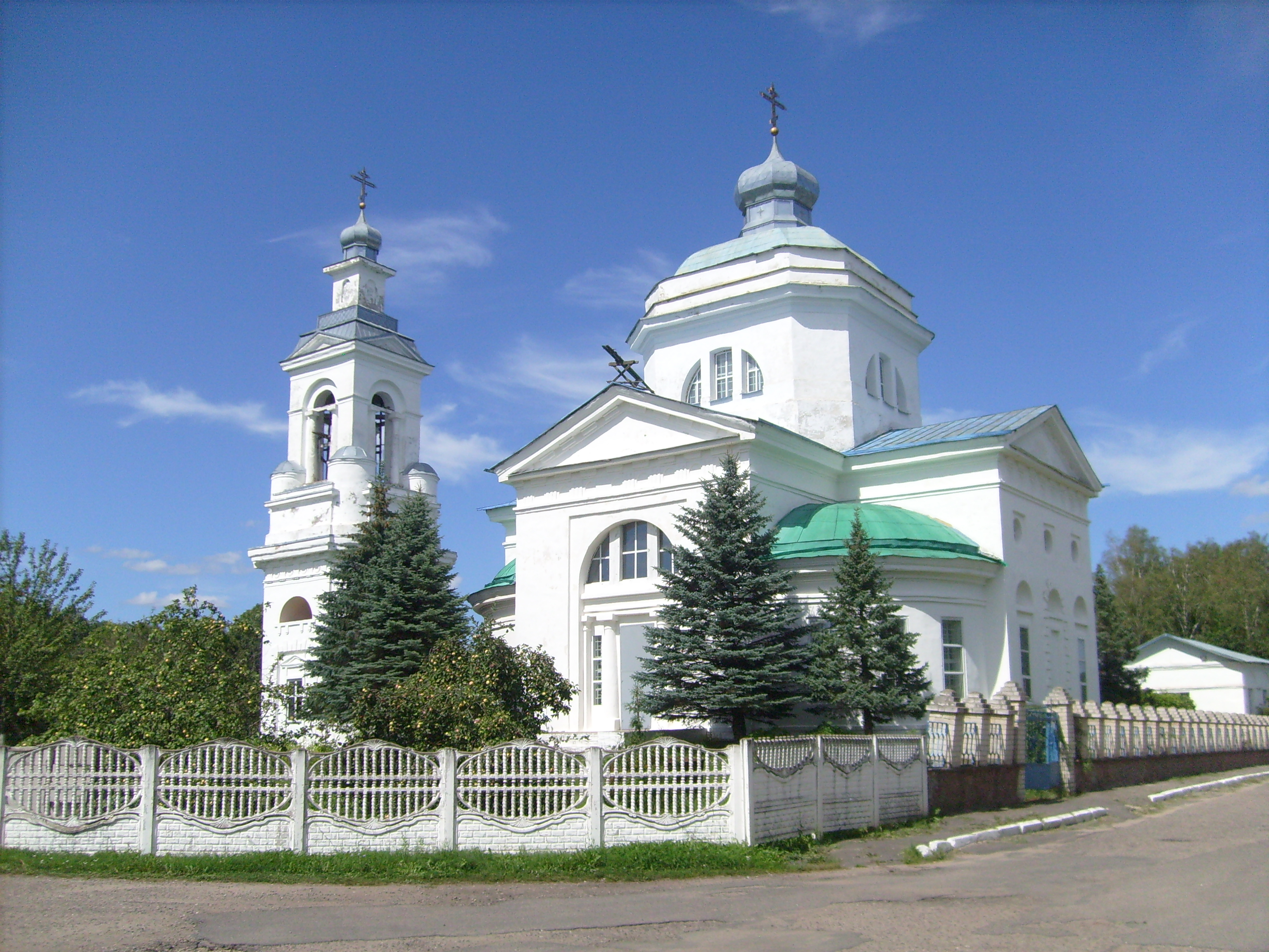 Церковь в Славгороде